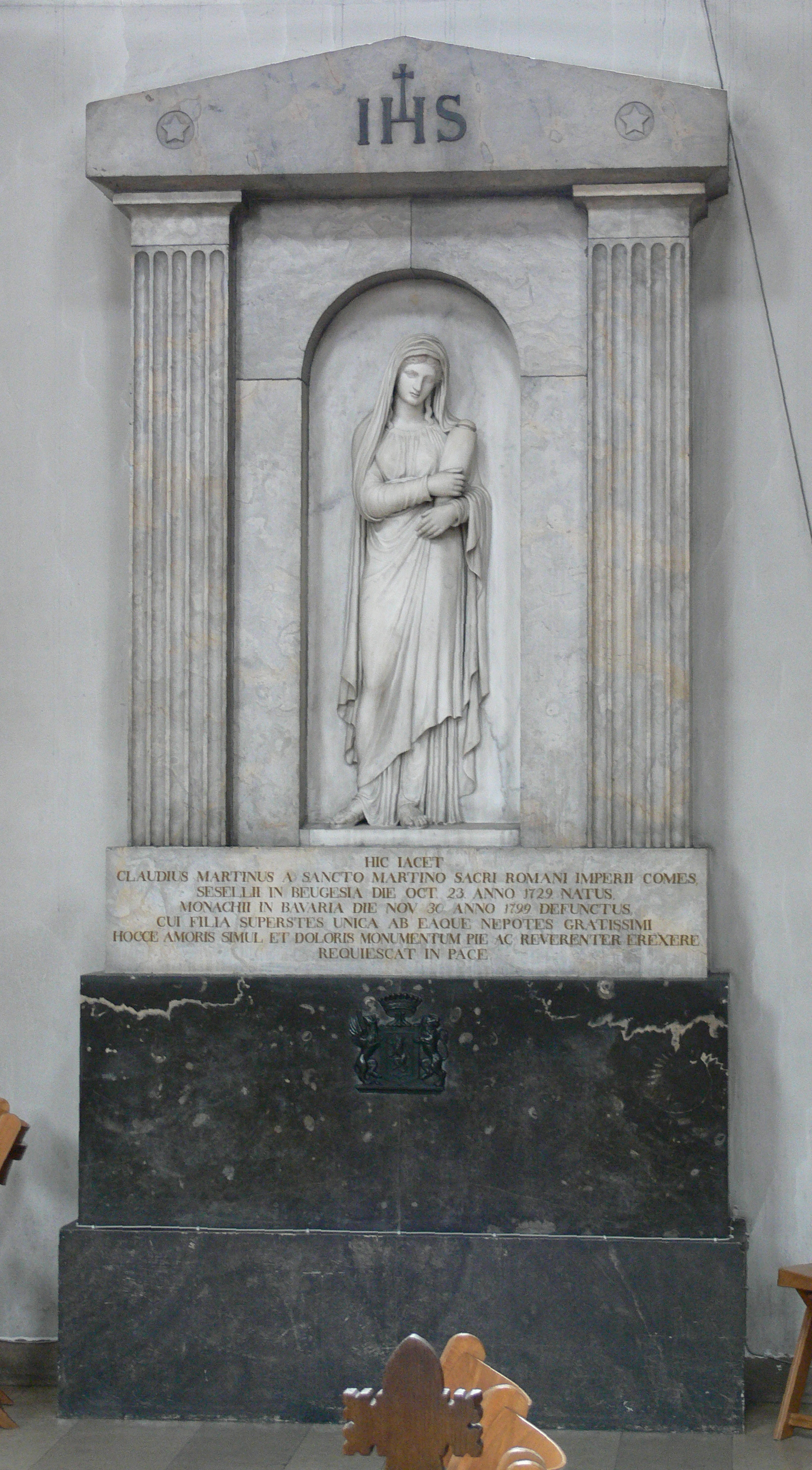 Heilig-Geist-Kirche (Kath. Pfarrkirche Hl. Geist), Schwetzingerstadt, Mannheim Grabmal Claudius von Saint-Martin